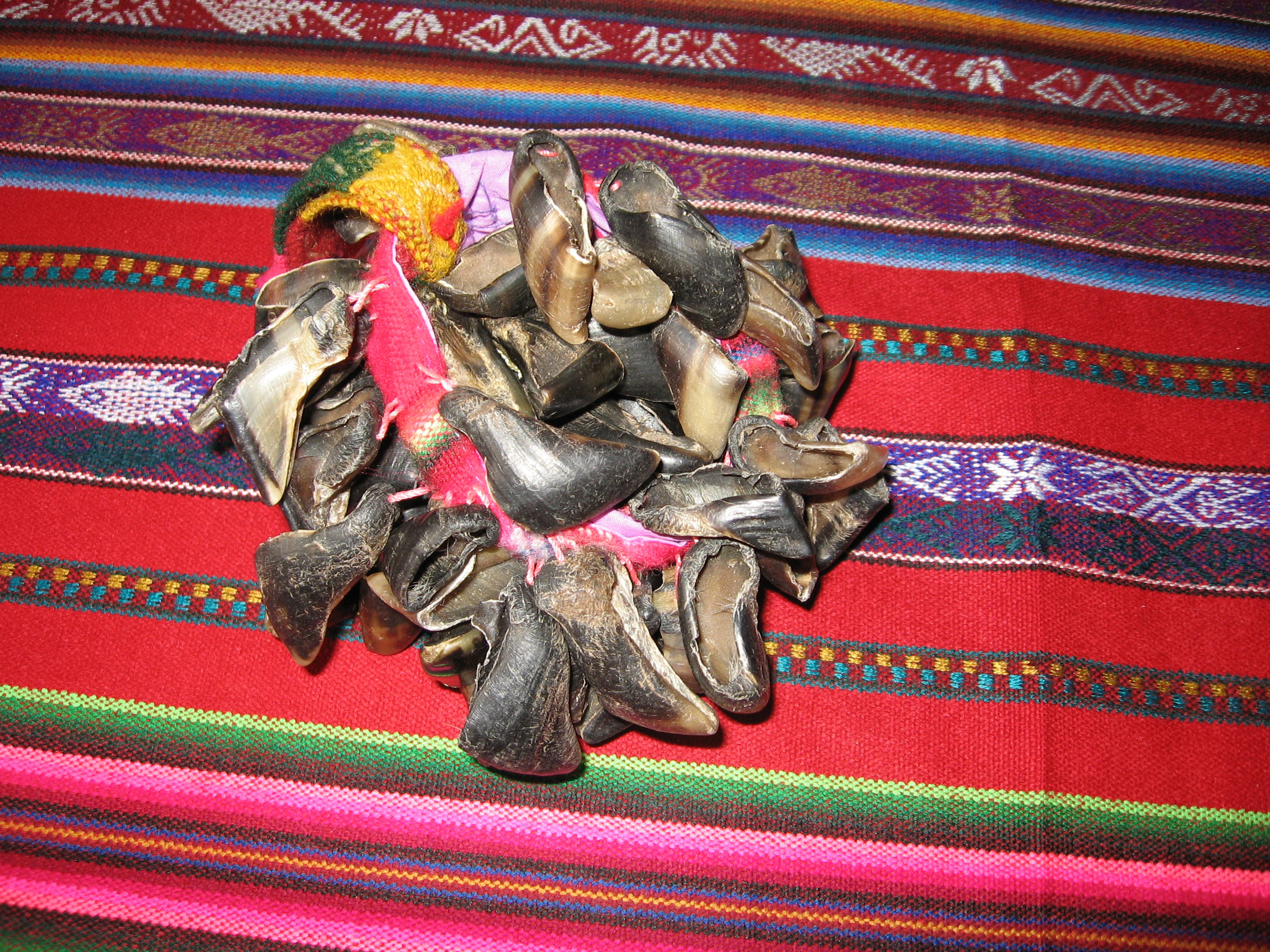 Pezuñas de cabra unidas a una tela, utilzado como instrumento de percusión andino a forma de sonaja